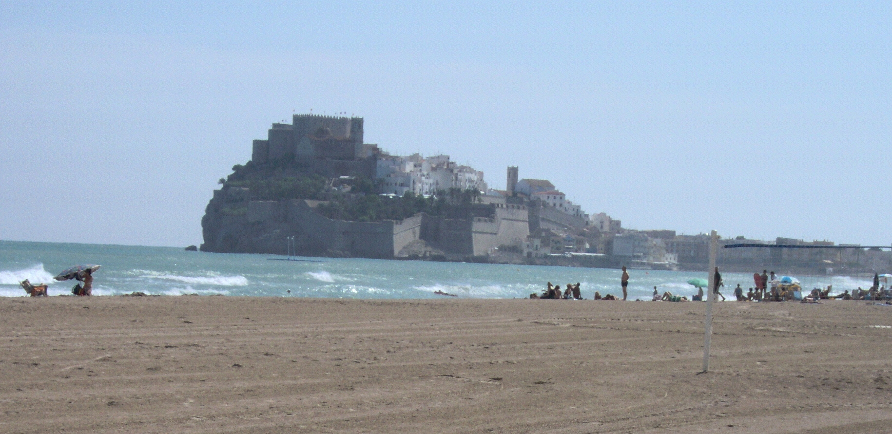 Peñiscola photographié depuis la plage. Auteur : Fagairolles 34